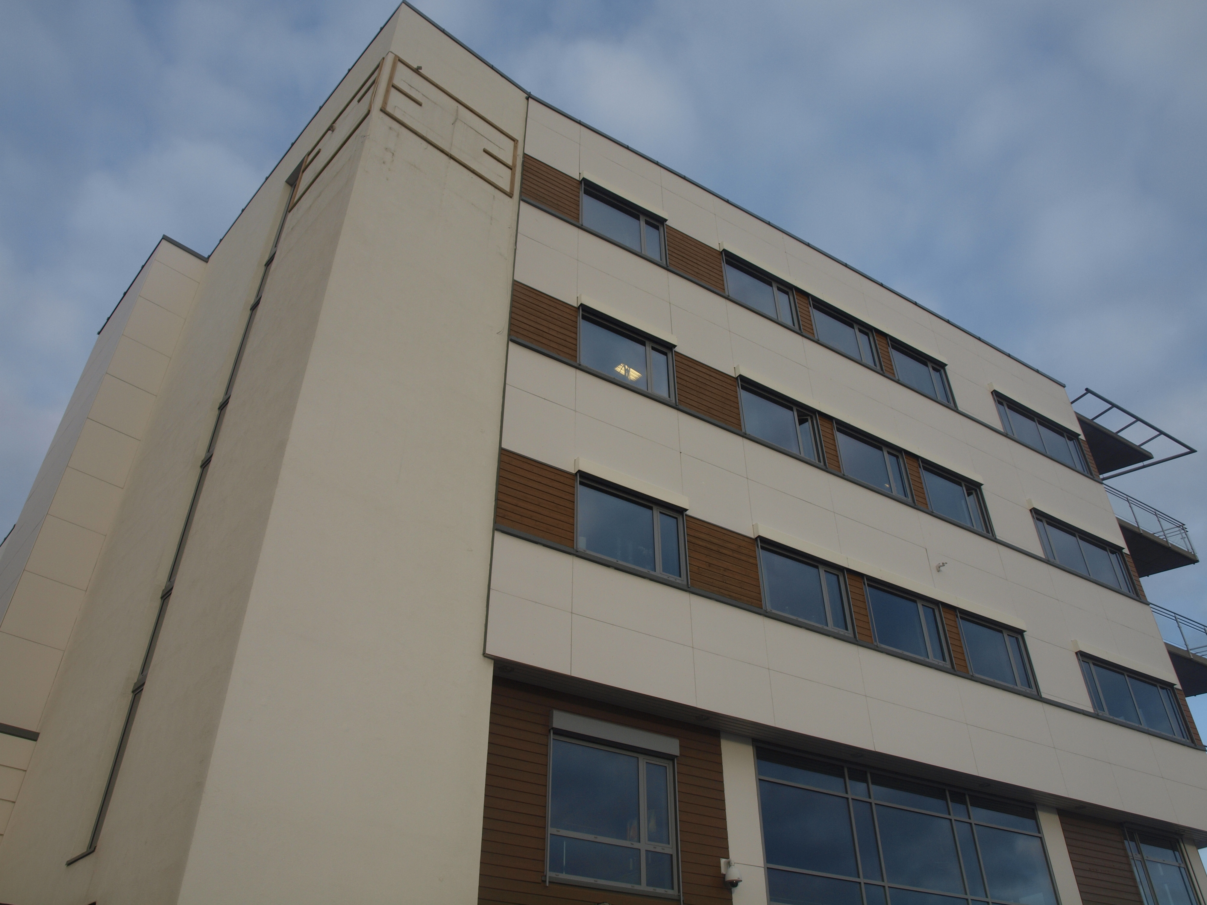 Linjebygg in Molde, Norway